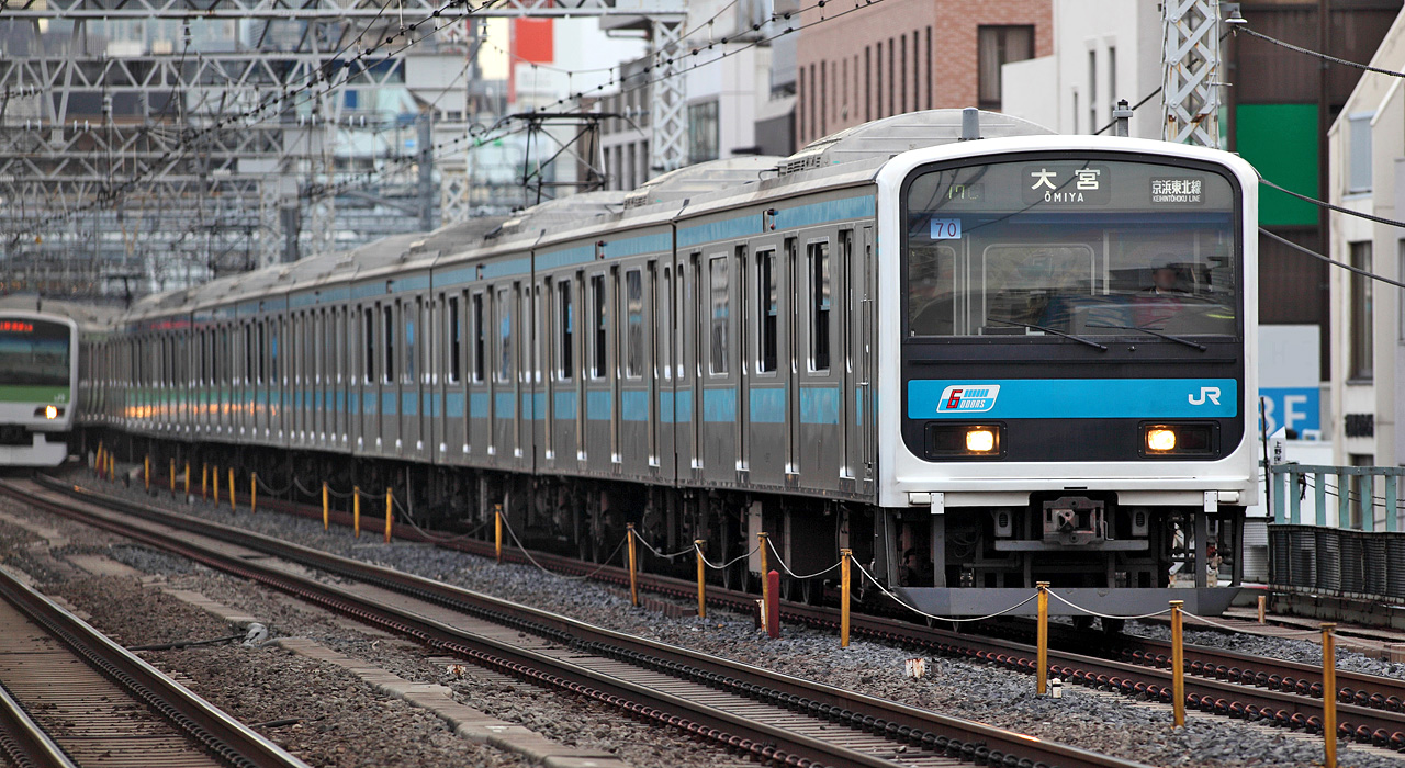 JR East 209 series EMU on Keihin-Tōhoku Line ( 70F / Akihabara Sta. ~ Okachimachi Sta. ).